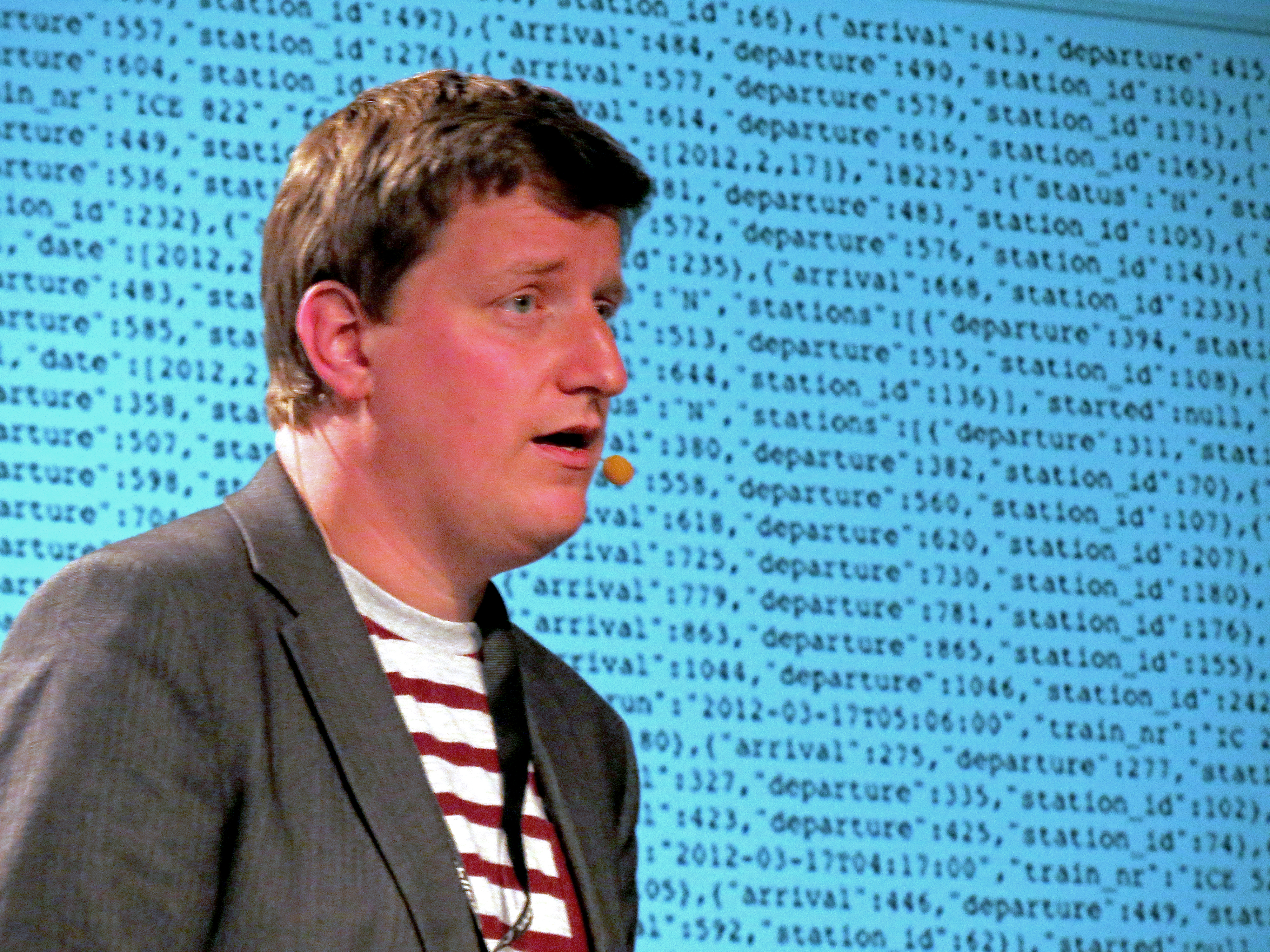 Stefan Plöchinger (sueddeutsche.de) erklärt den SZ Zugmonitor auf der re:publica 2012.